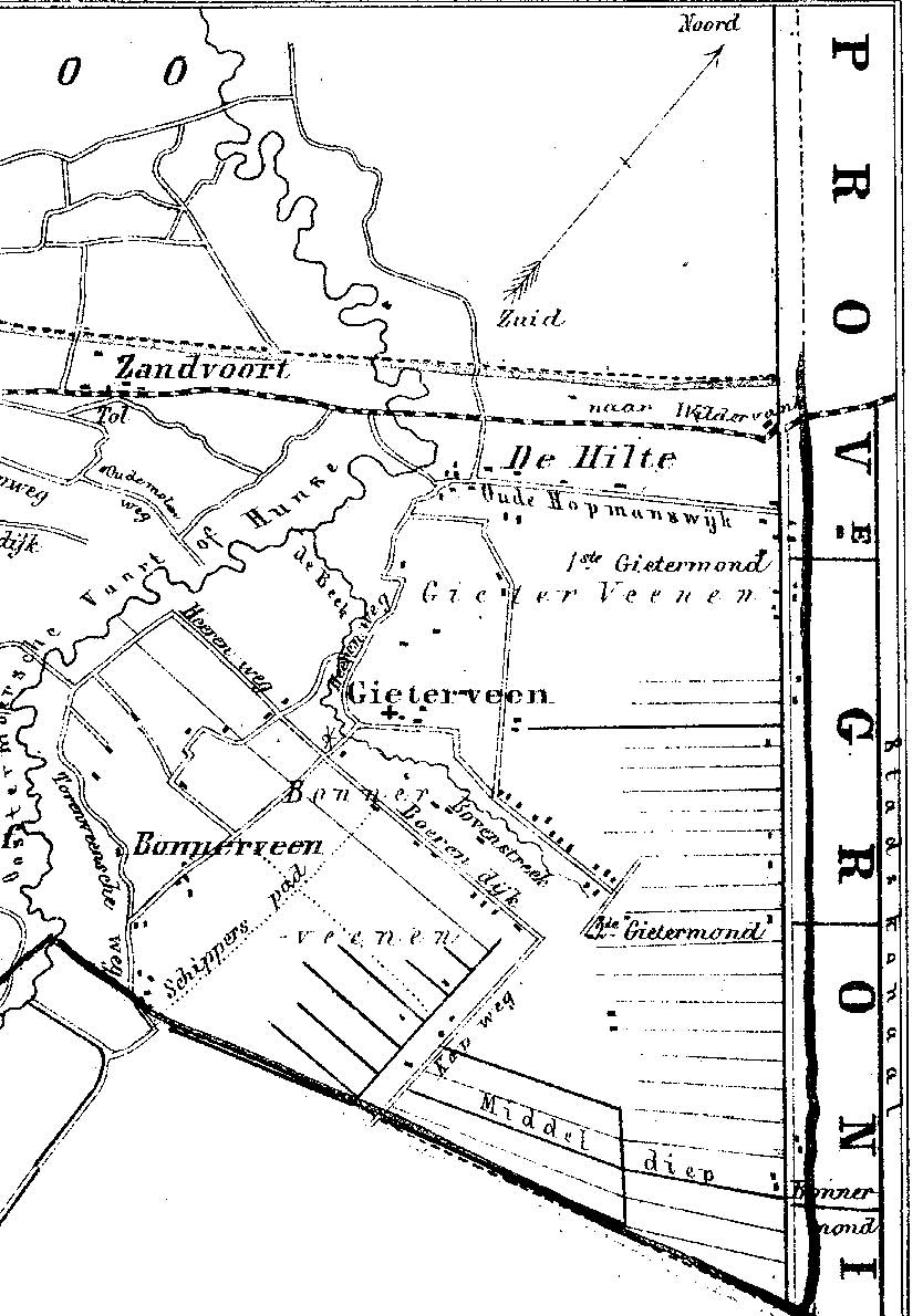 Fragment omgeving Gieterveen (met 1e en 2e Gietermond)